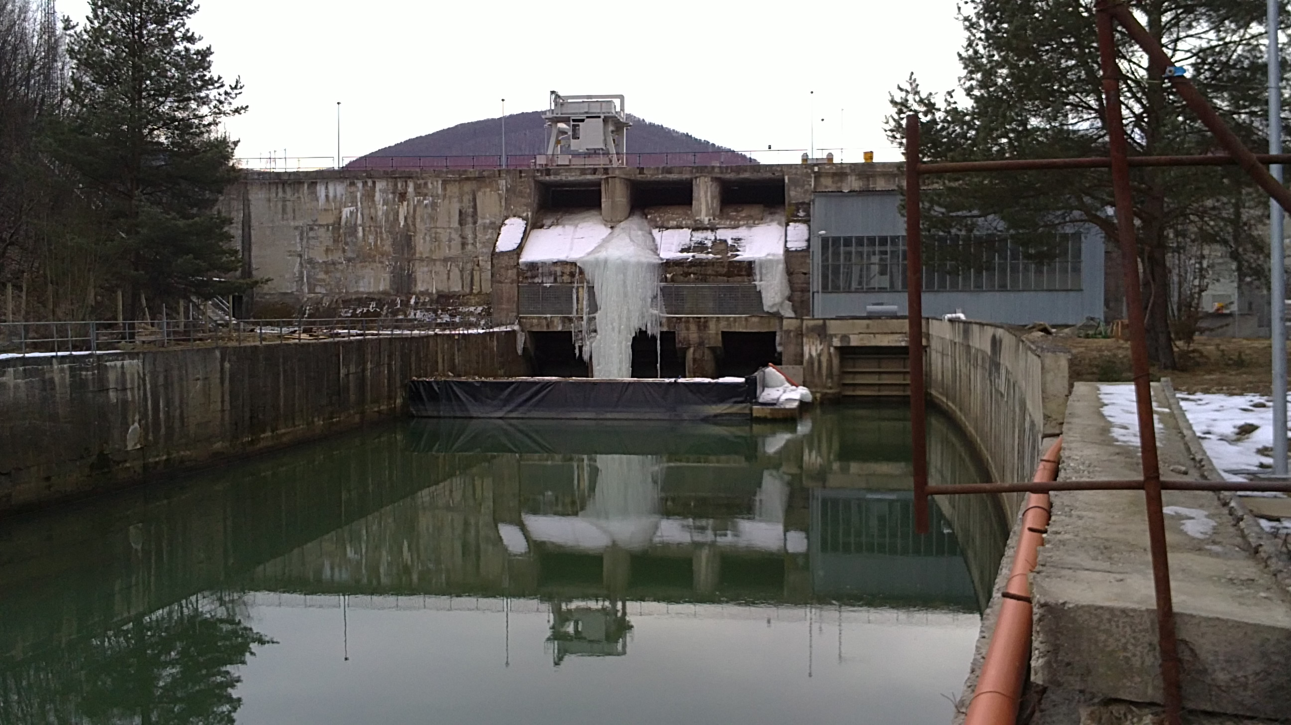 Vodné dielo Malá Lodina ( Ružín).